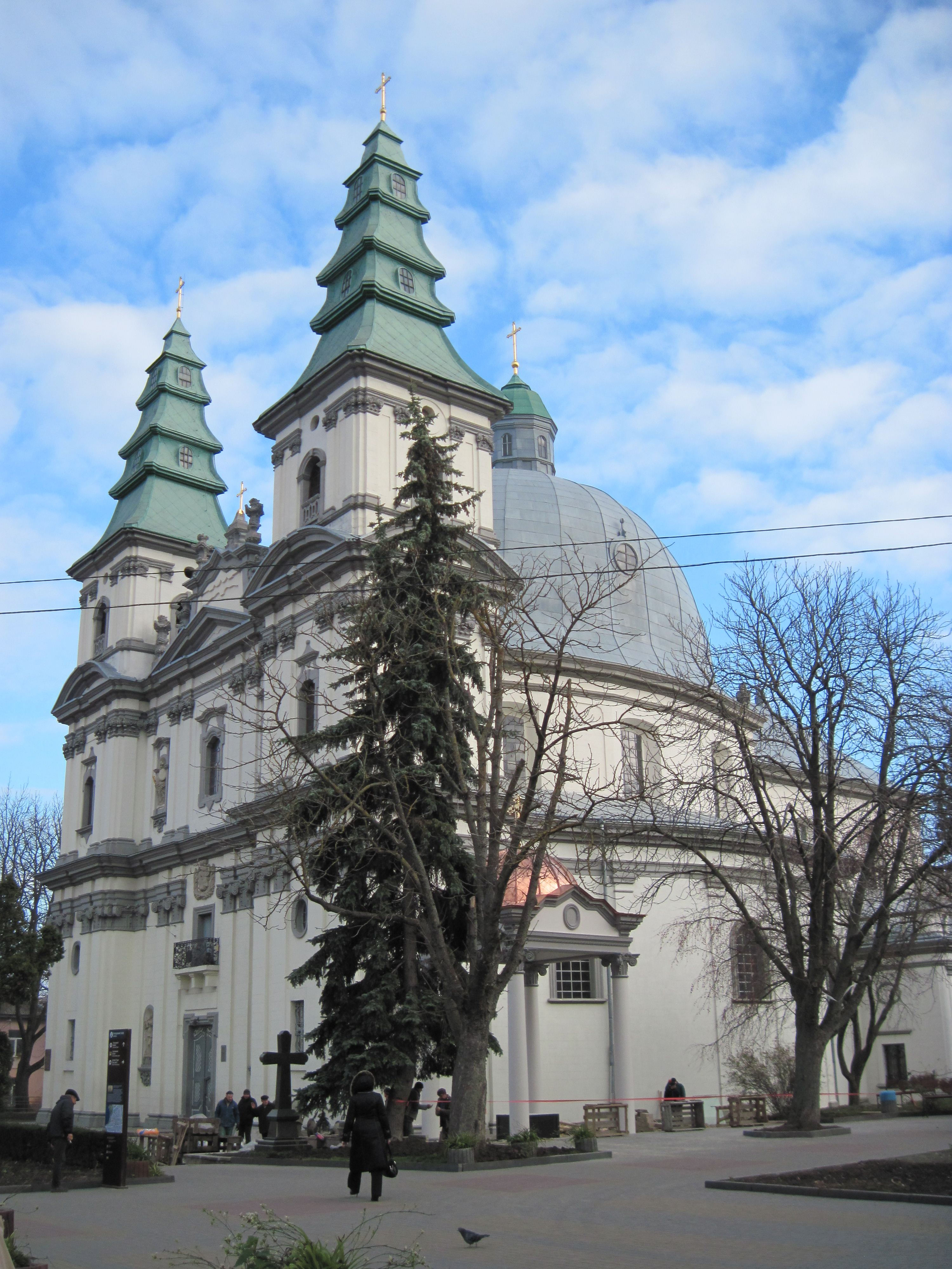 Катедра УГКЦ. Тернопіль, осінь 2013